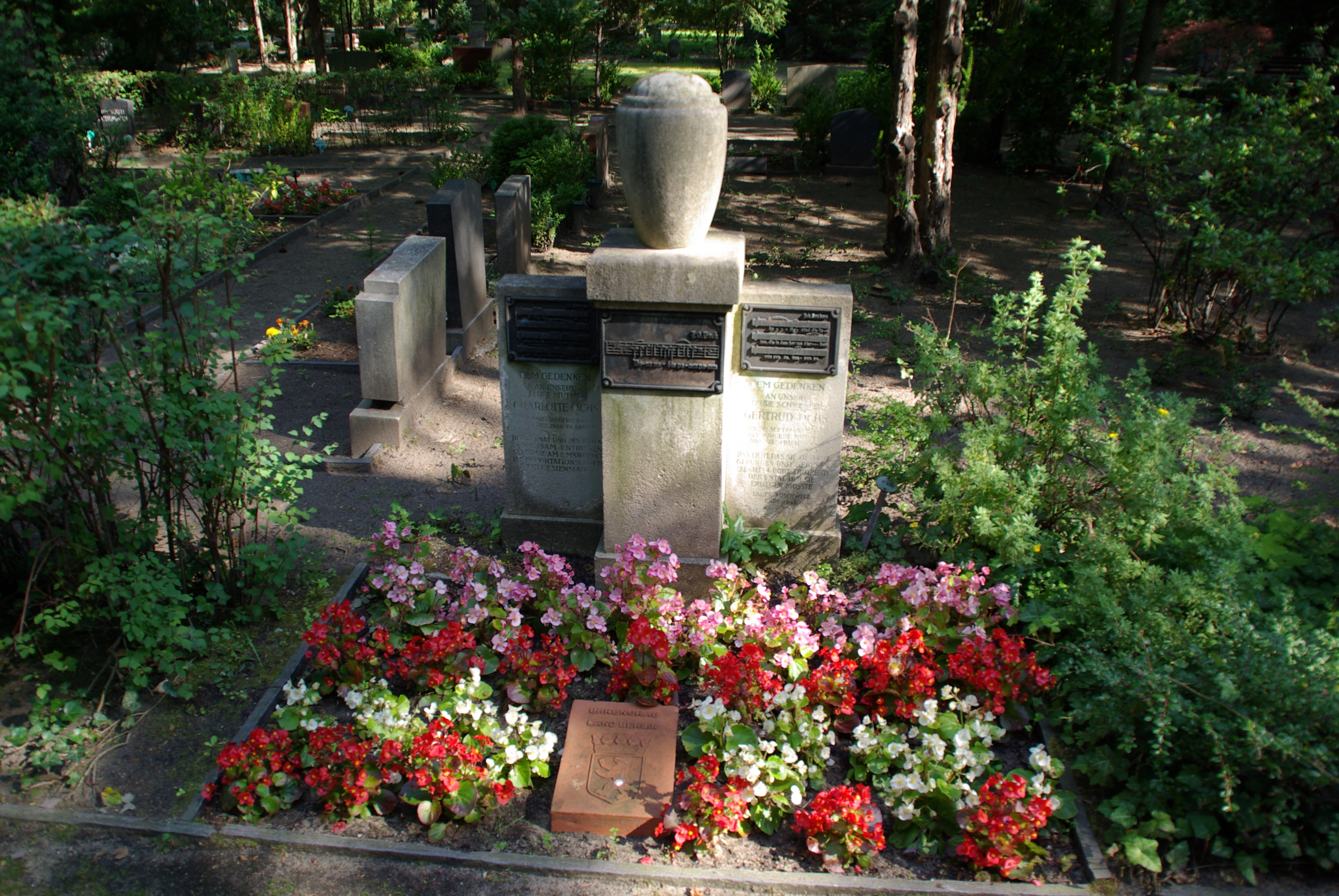 Berlin-Wedding. Der Urnenfriedhof in Berlin-Wedding steht unter Denkmalschutz. Das Ehrengrab von Siegfried Ochs, dem Gründer des Cjores der Philhamonie.